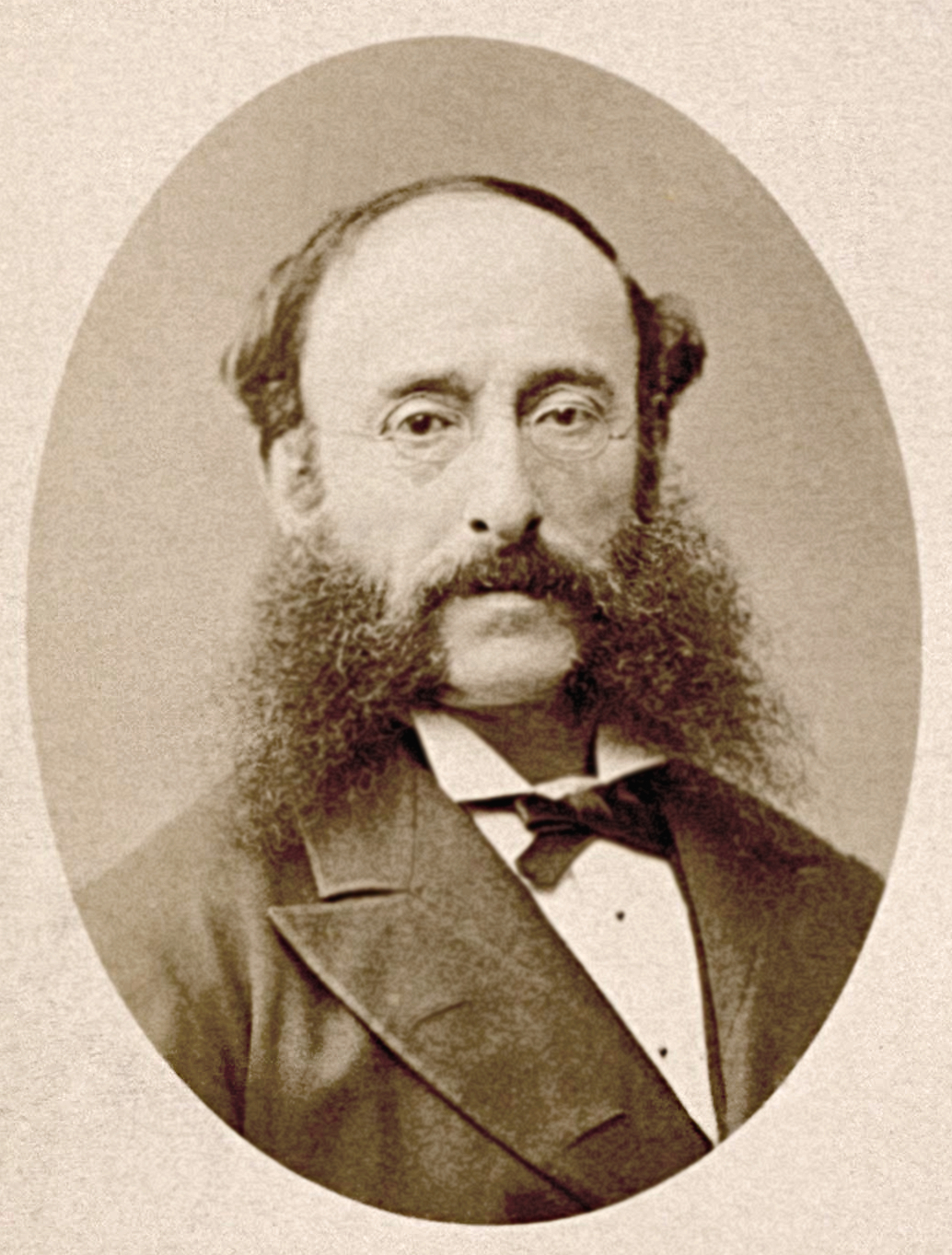 Paul Julius Reuter (1816 - 1899), journaliste et homme de média britannique d'origine allemande, fondateur de l'agence Reuters.